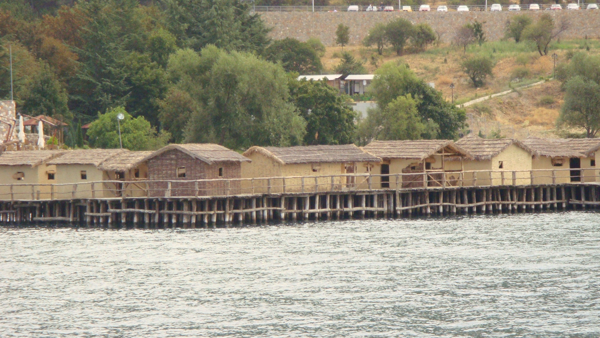 Во Охридско Езеро, рибарско село